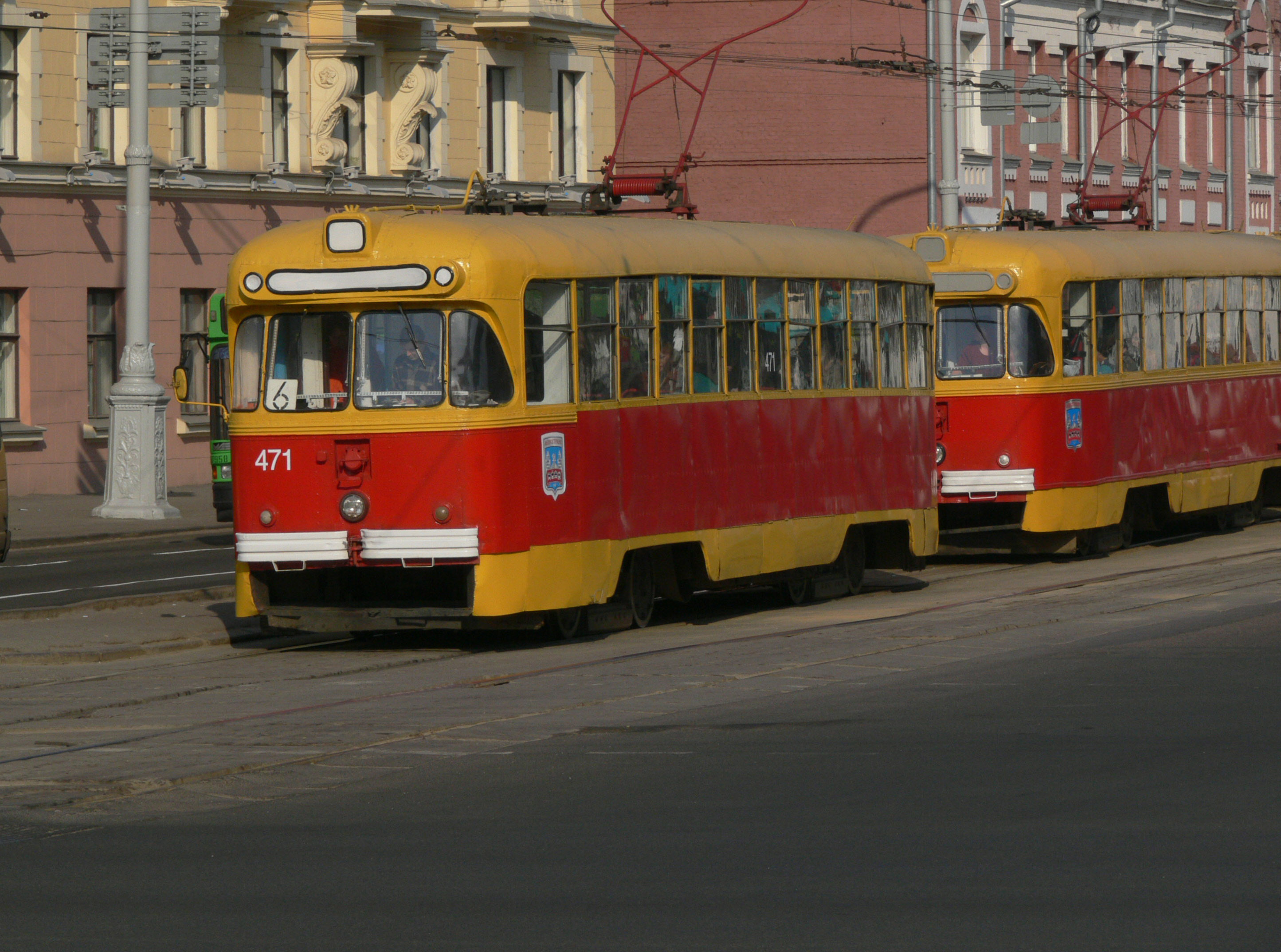 RVZ-6M2 tram in Minsk